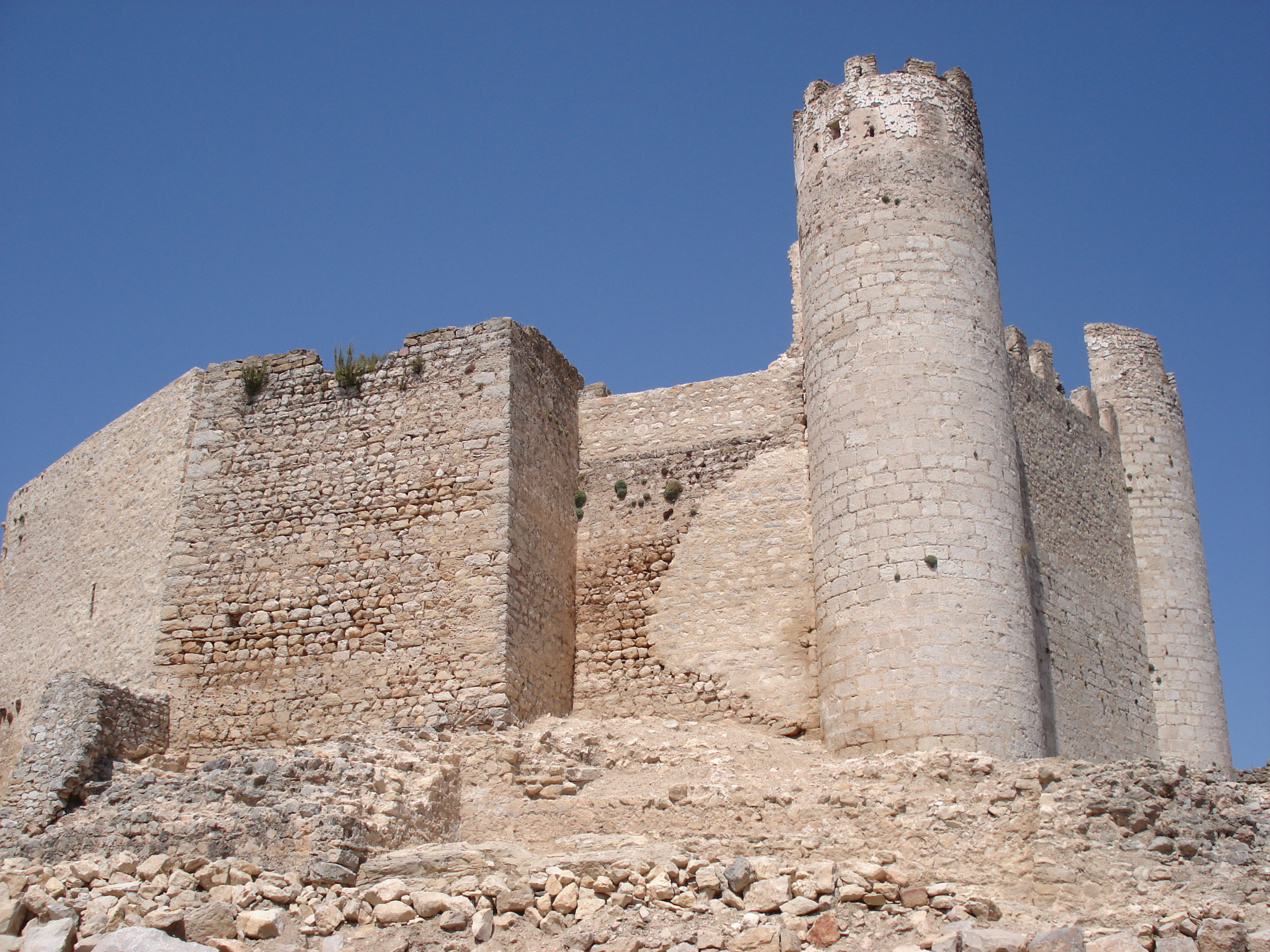 Castillo de Alcalá de Chivert (Castellón, España)